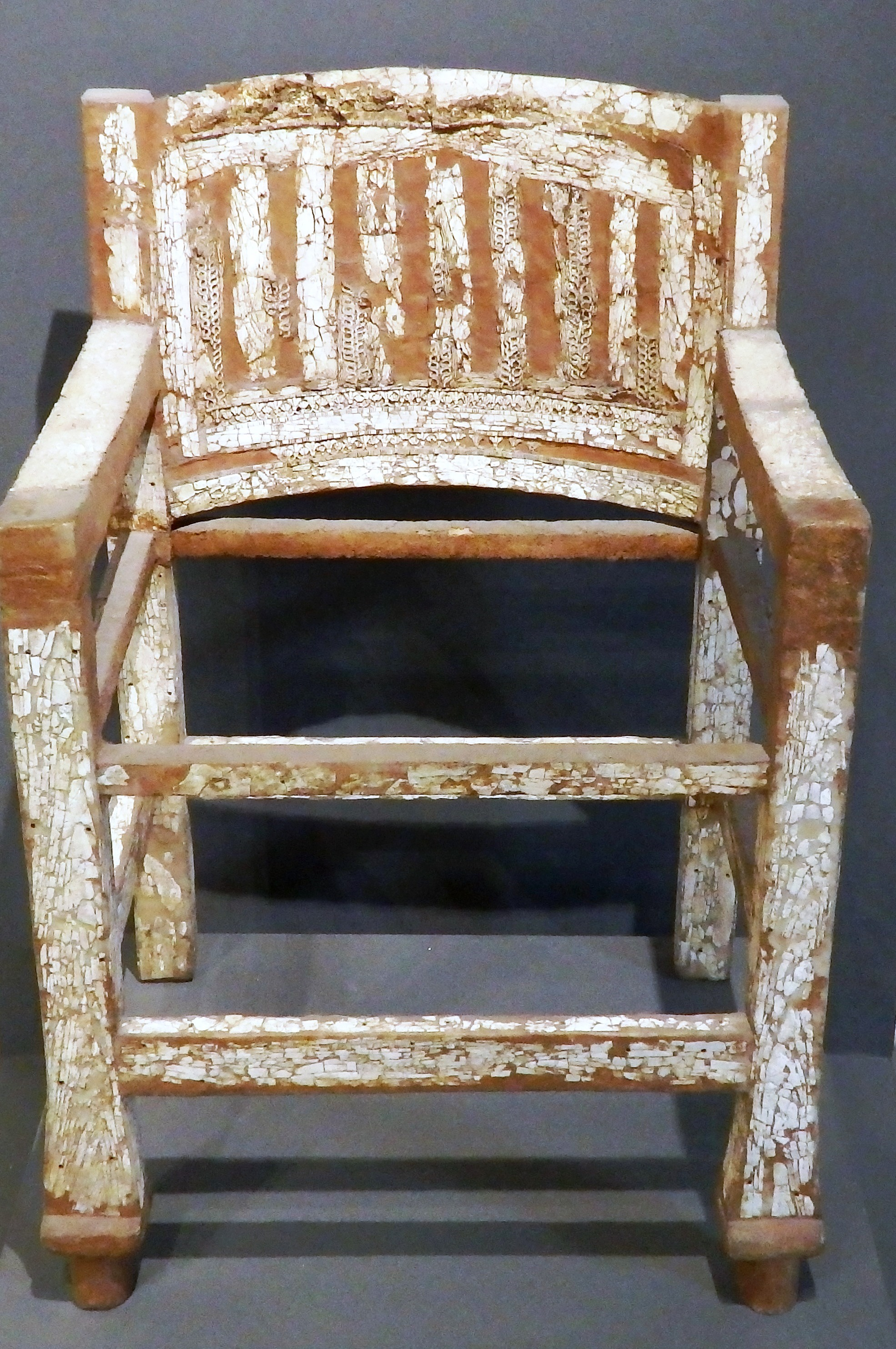 Thron aus Holz mit Elfenbeinplaketten, Salamis, Grab 79, spätes 8. Jh. v.Chr., Zypernmuseum